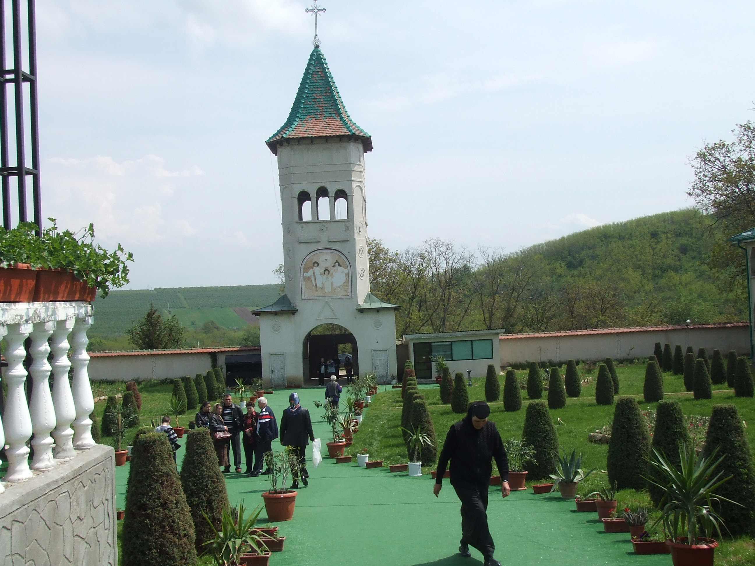 Moreni